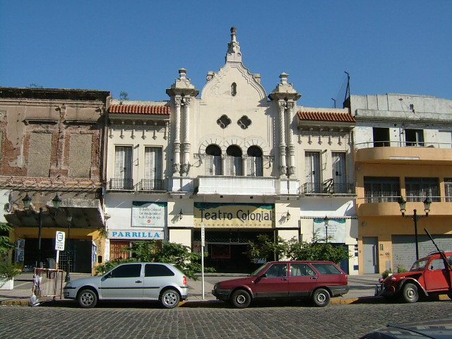 Teatro Colonial (Avellaneda, Argentina)